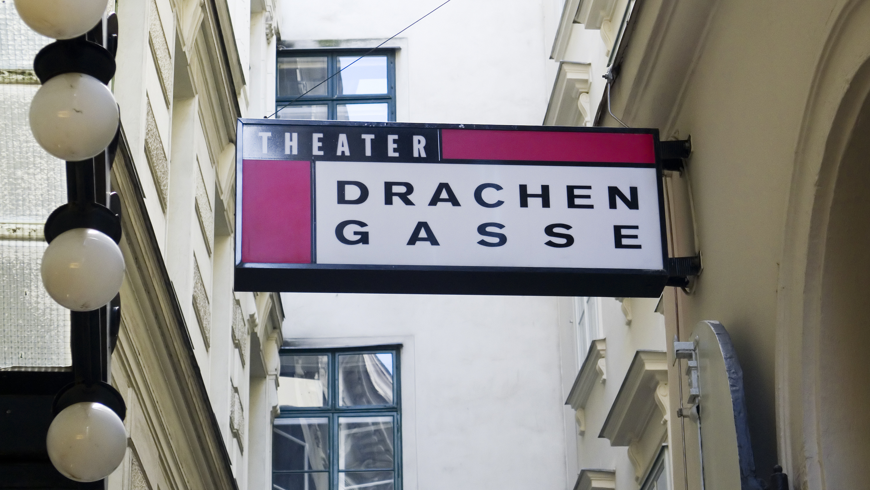 Theater Drachengasse in Wien 1